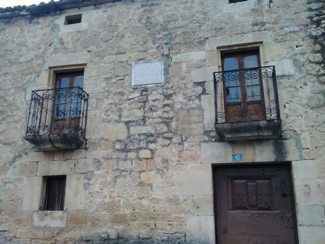 Casa en la que nació y vivió Misael Bañuelos durante su infancia, situada en Tabla del Rudrón, provincia de Burgos, España.